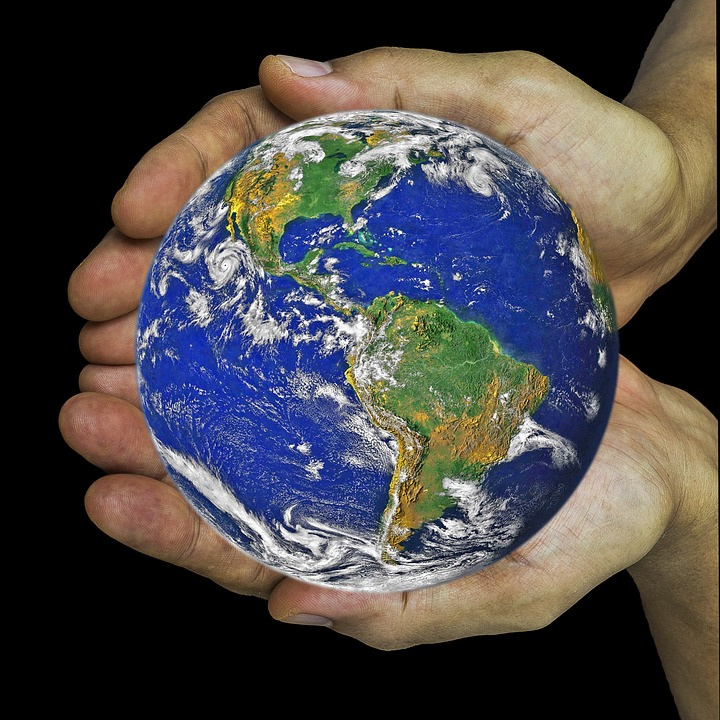 Arengukoostöö